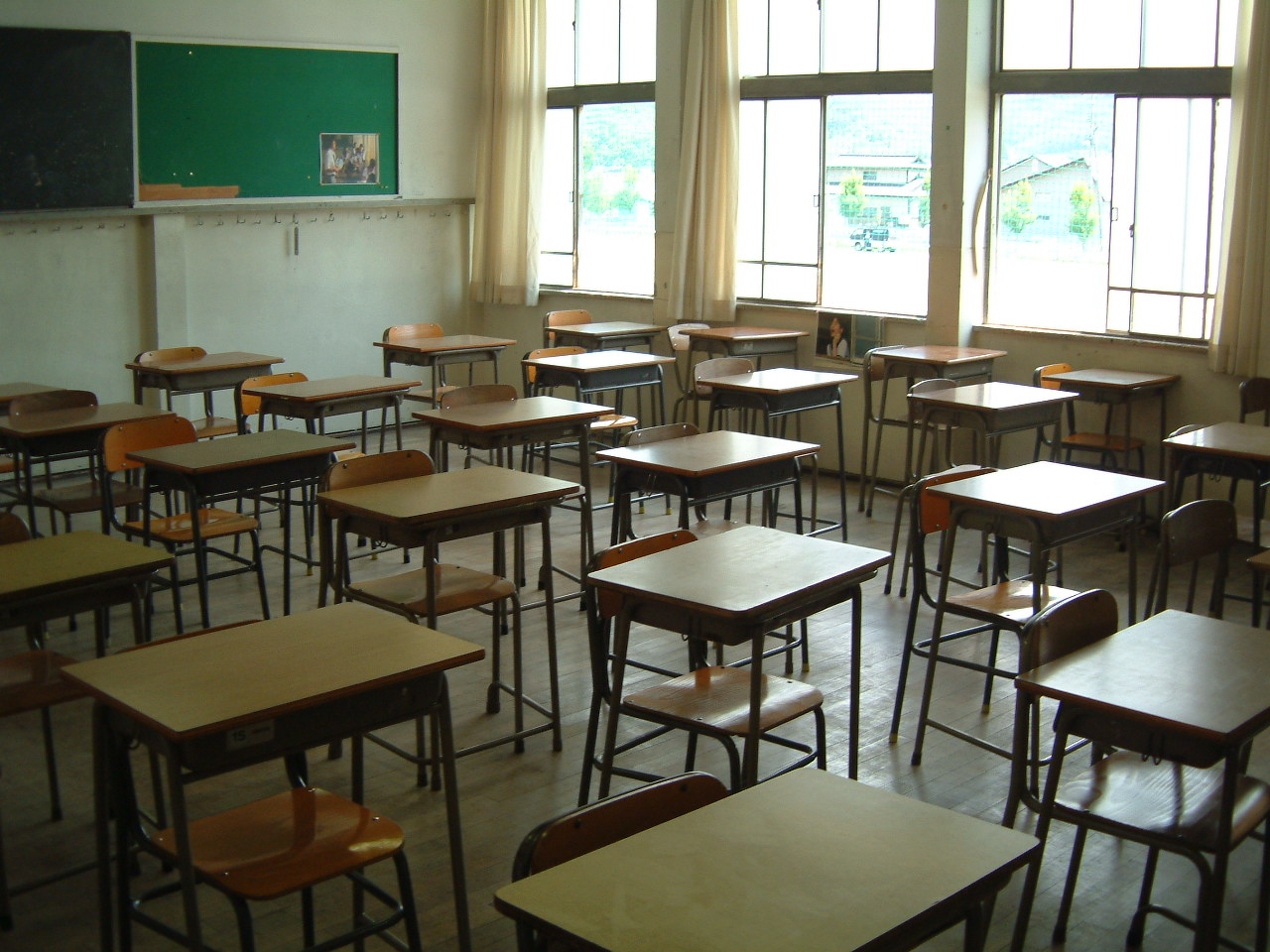 classroom 旧高畠高校 教室